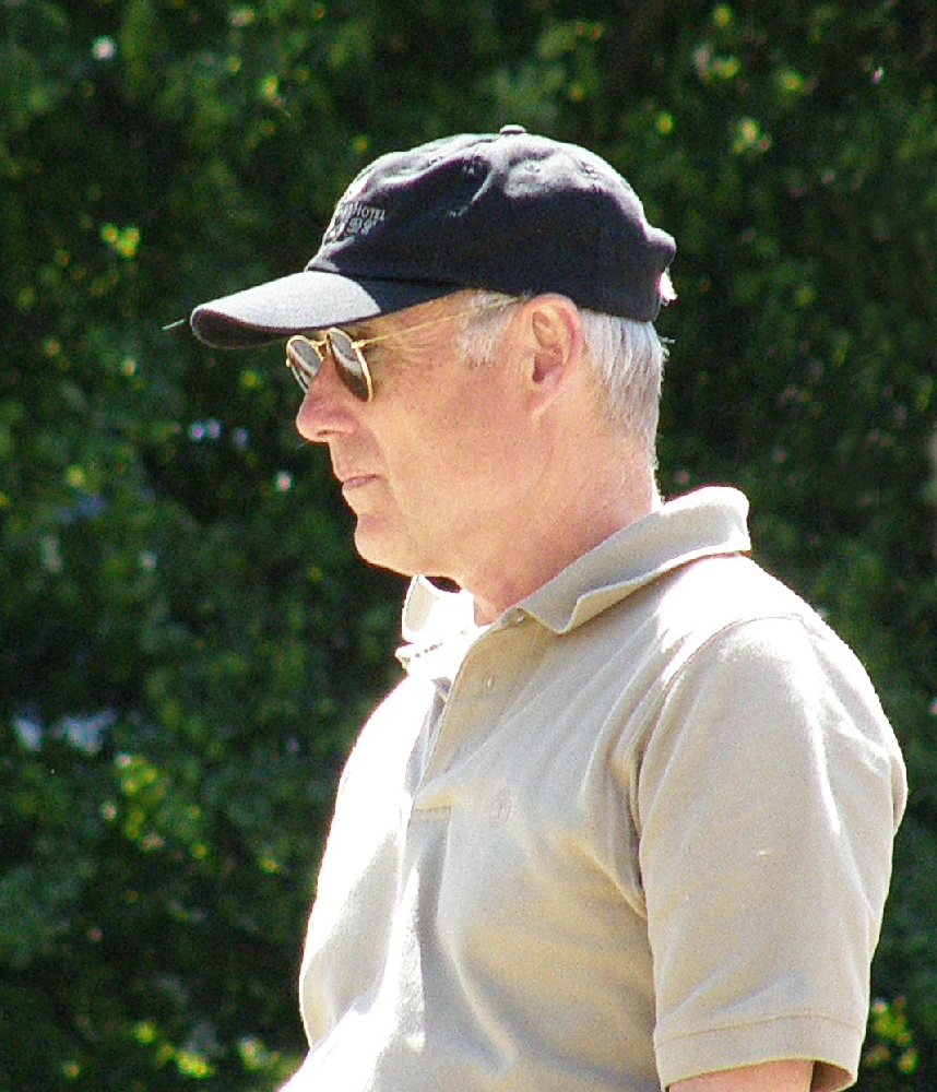 Strefan Aust